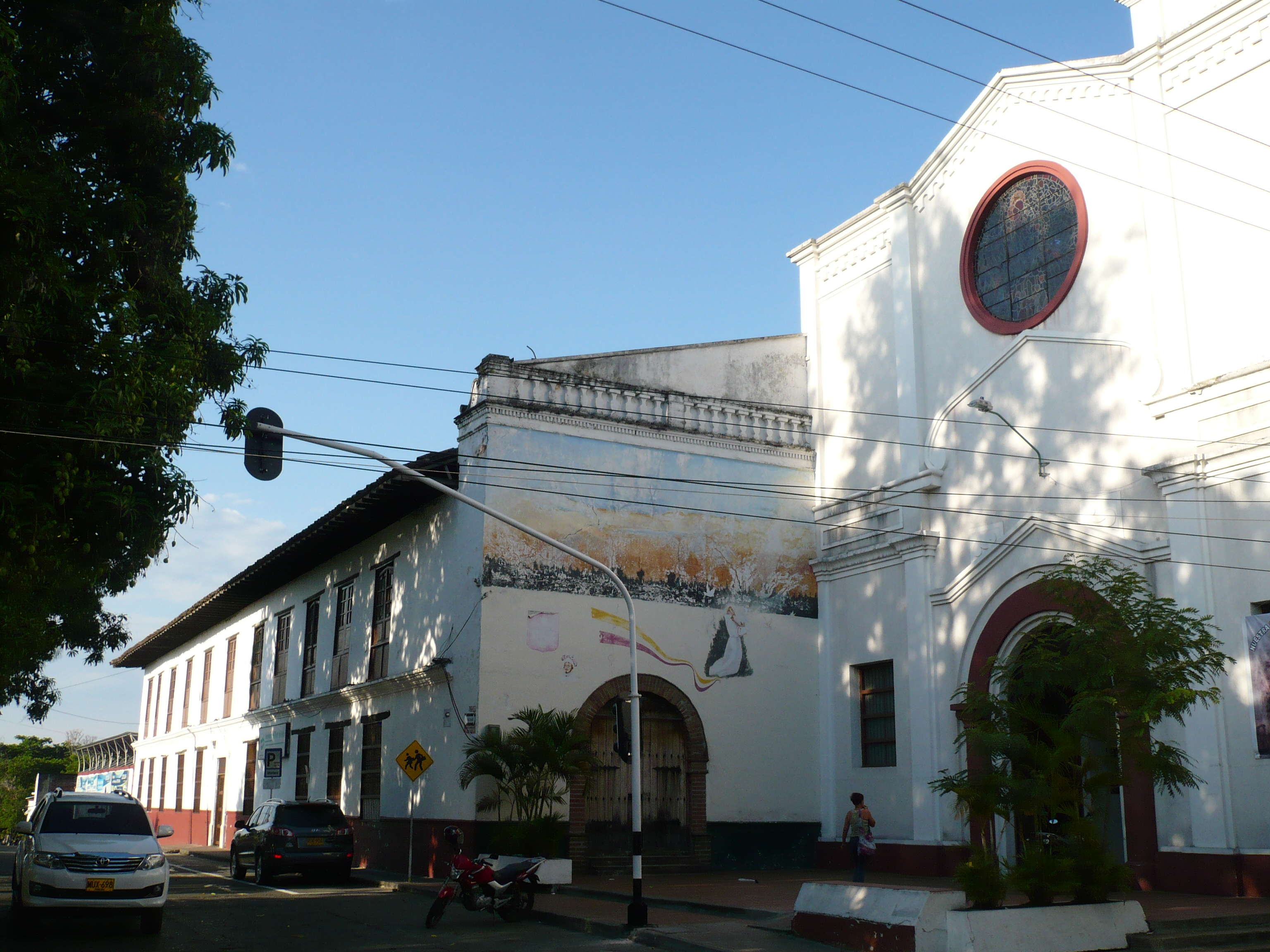 Iglesia de Nuestra Señora de la Pobreza (Templo de San Francisco) & COTECNOVA (Corporación de Estudios Tecnológicos del Norte del Valle). Cartago, Valle del Cauca, Colombia.